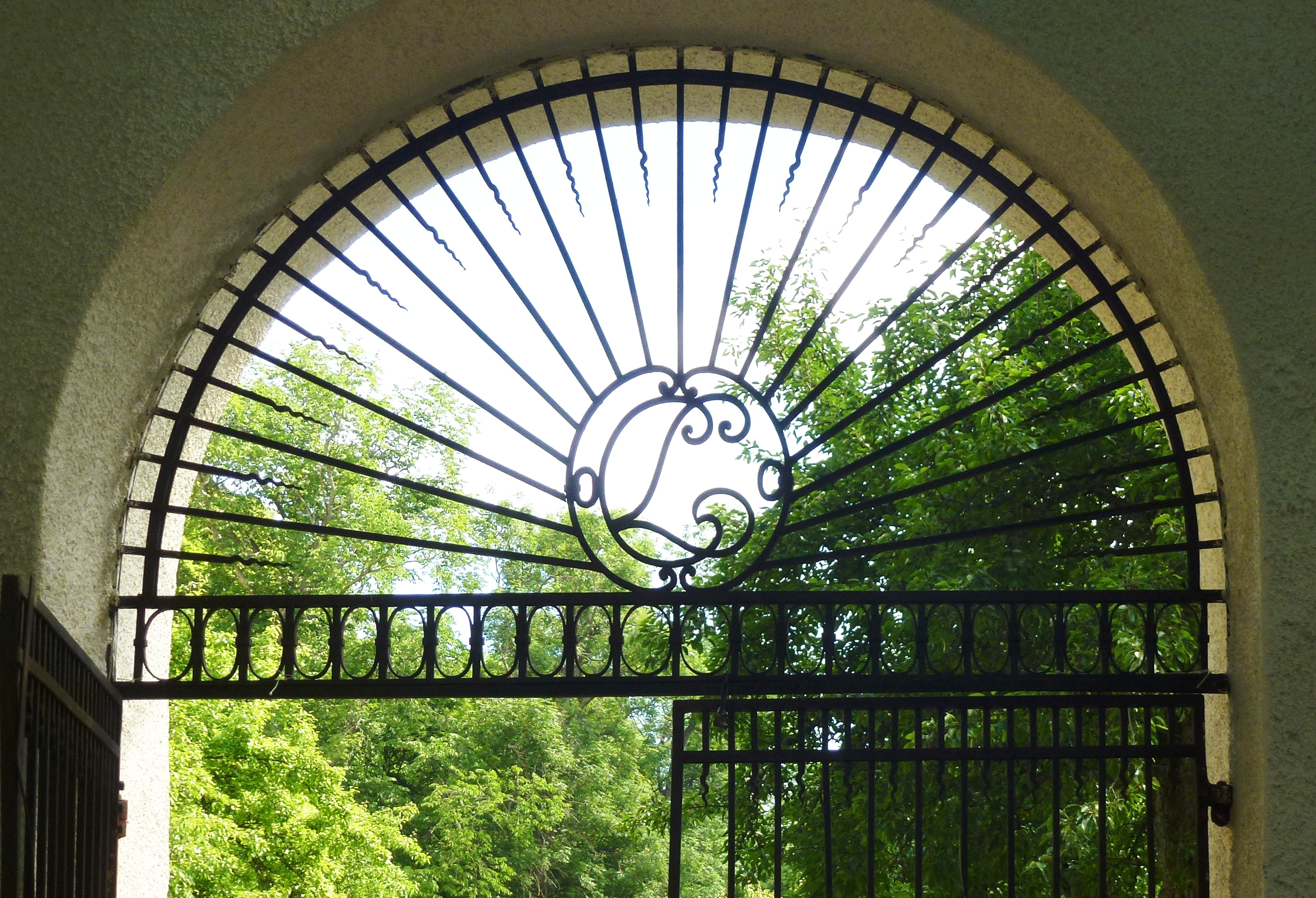 Claes Lagergrens initialer i smidesgrinden på Tyresö slott